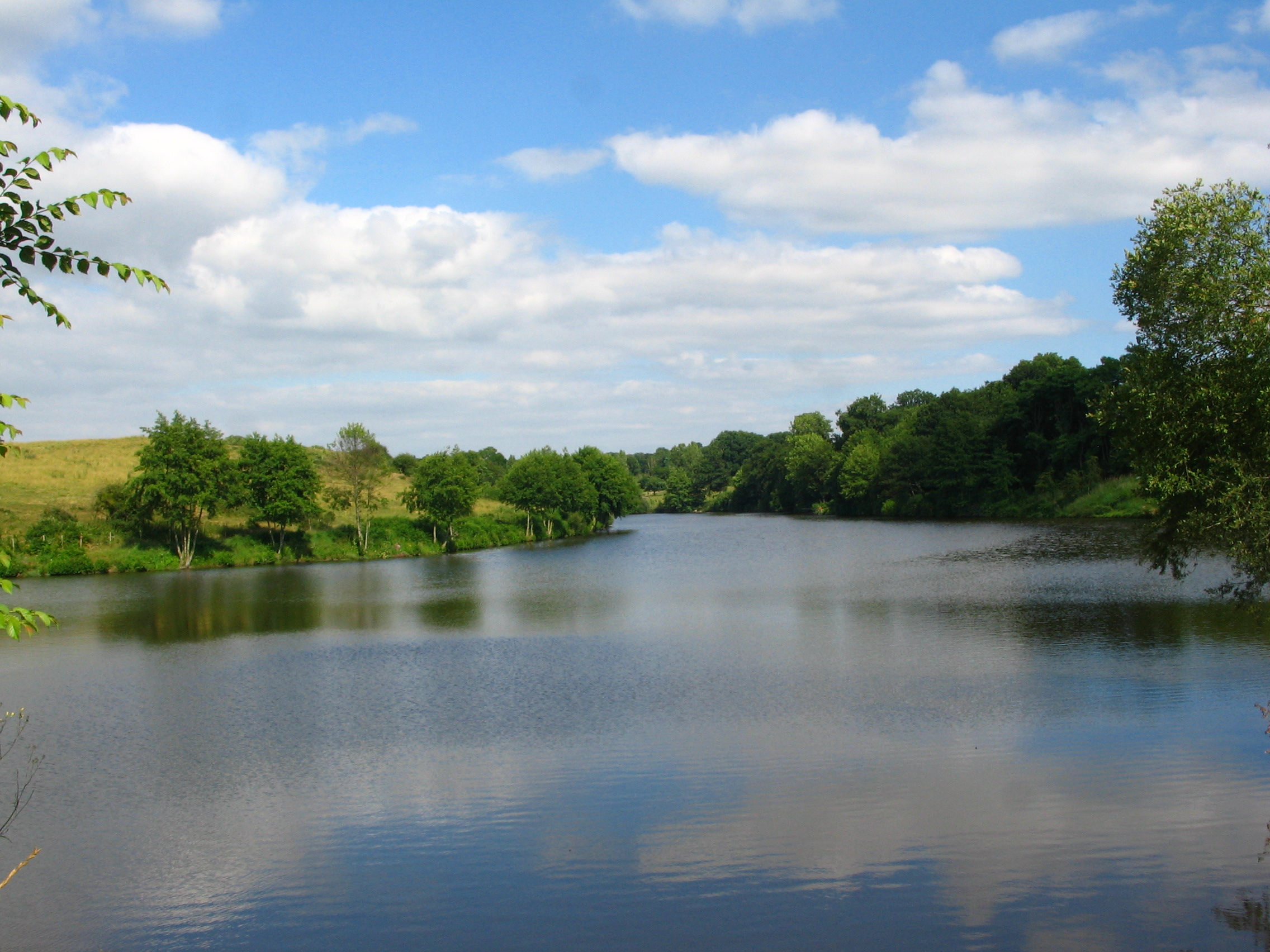 Aperçu lac du Verdon (Maine-et-Loire).